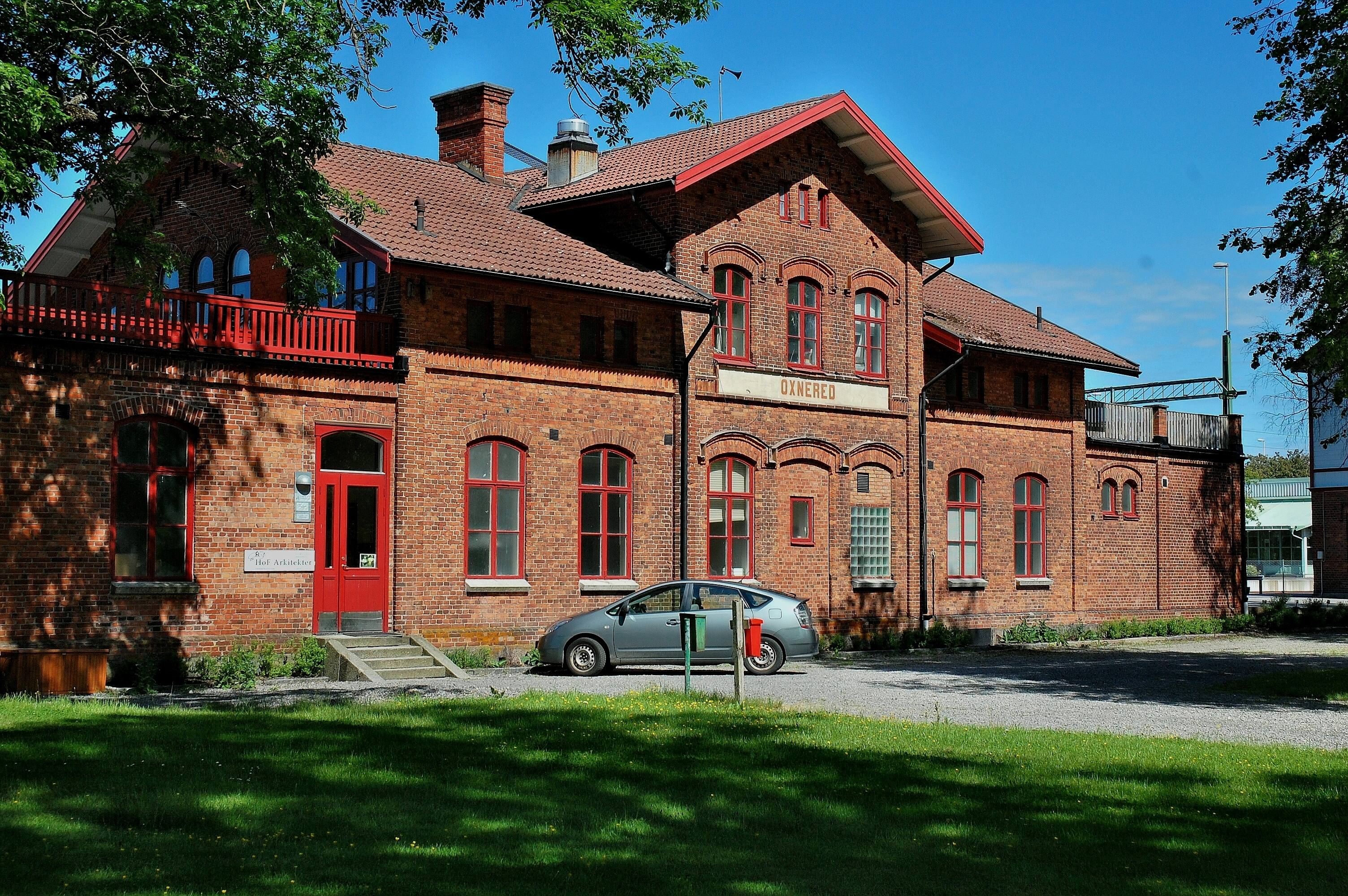 Öxnereds stationshus